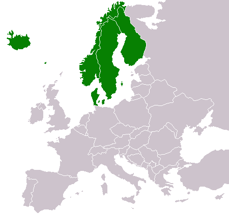 Nordiska passunionen: Norge, Sverige, Finland, Island och Danmark The Nordic Passport Union: Norway, Sweden, Finland, Iceland, Denmark. Die Nordische Passunion, Norwegen, Schweden, Dänemark, Finnland und Island.